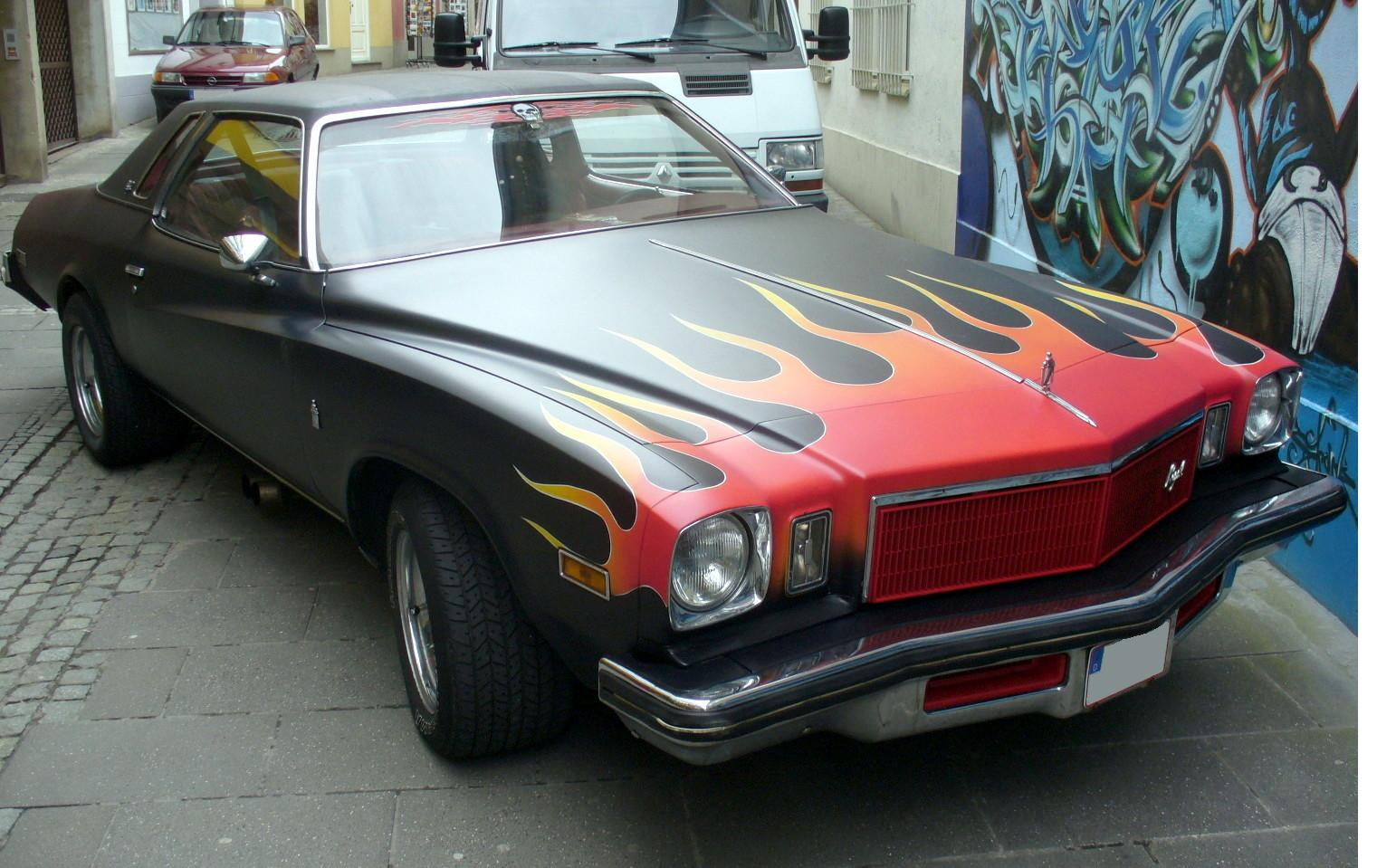 Buick Regal